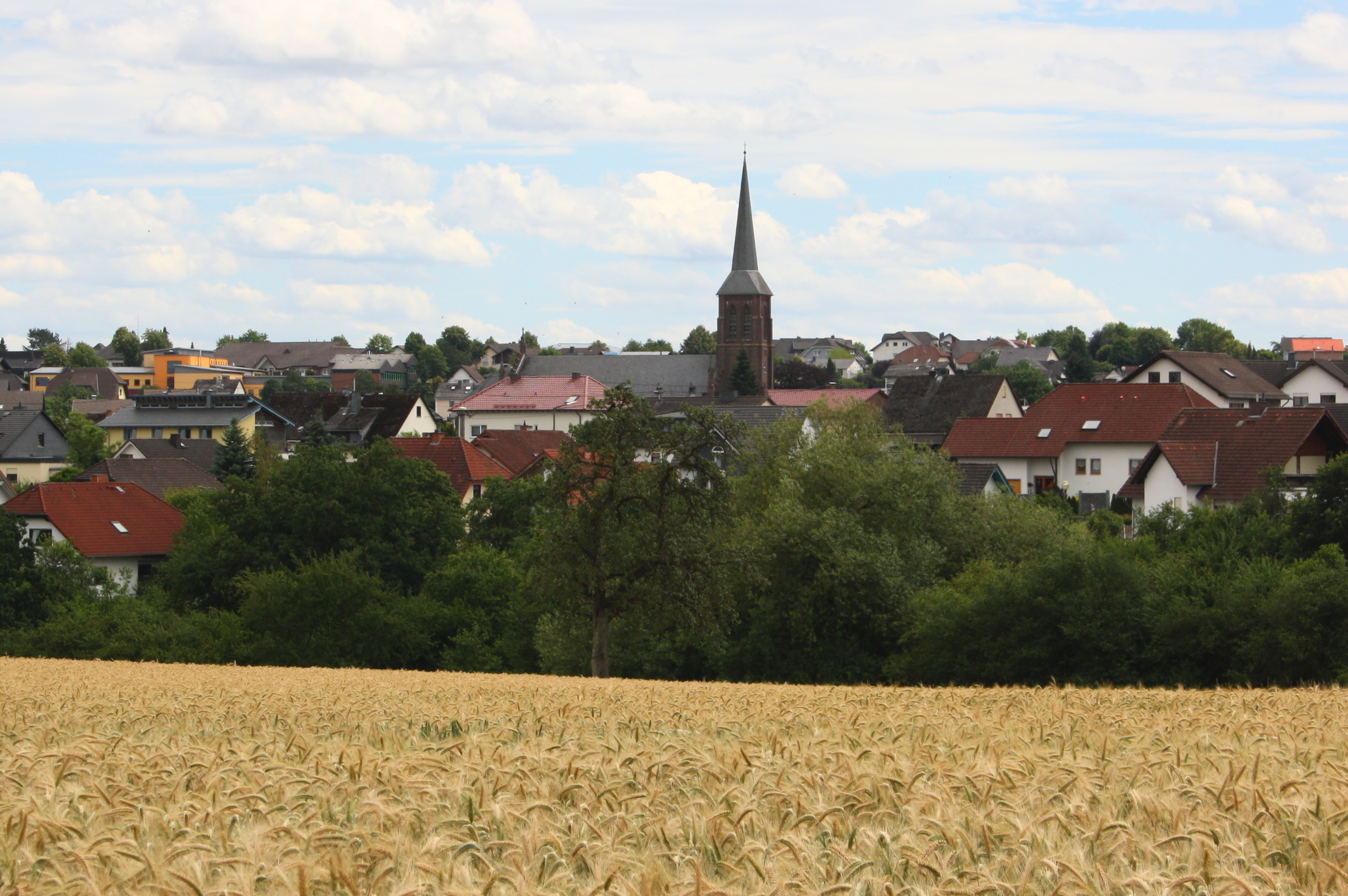 Nentershausen, Westerwald, Rheinland-Pfalz, Deutschland